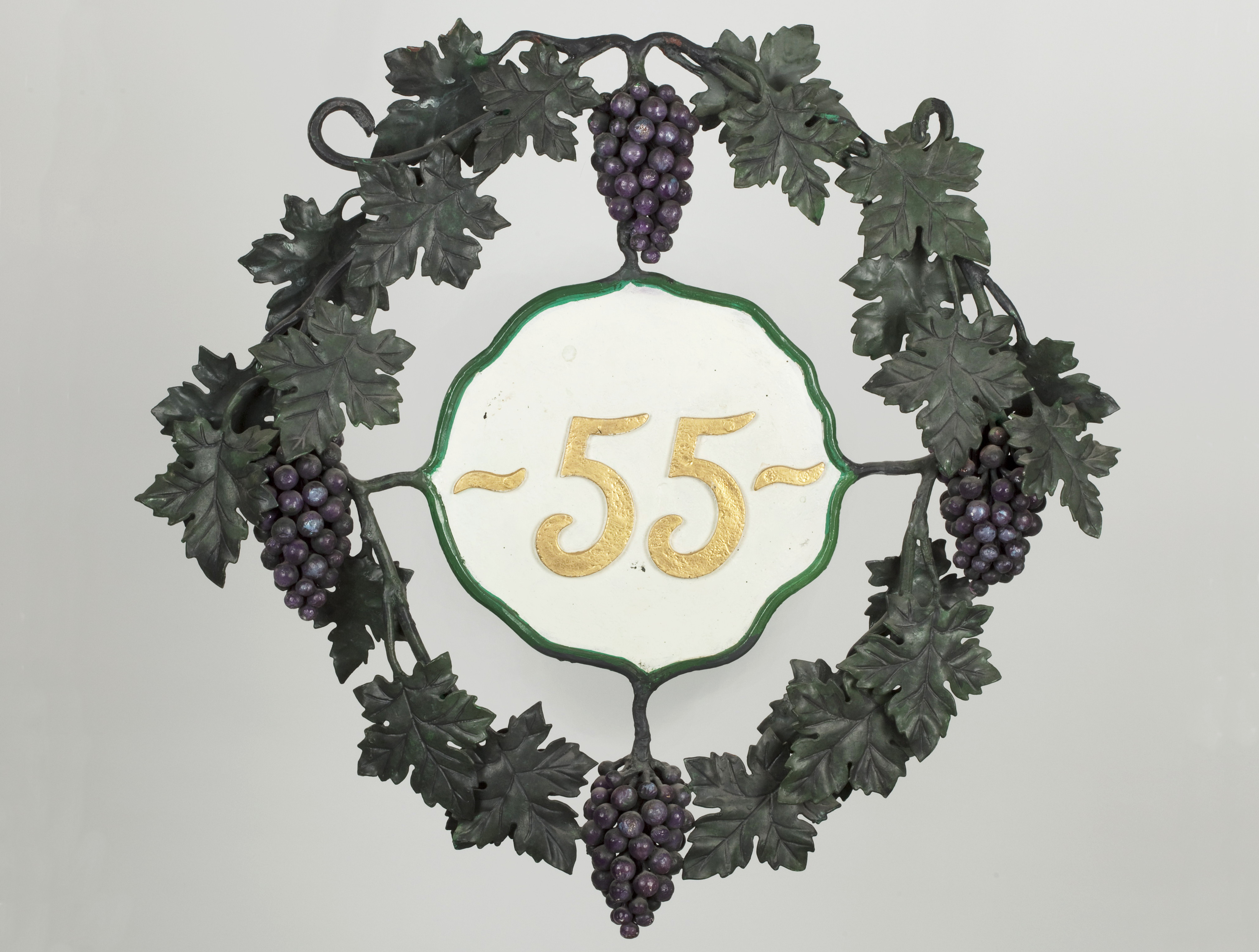 Dubbelsidig skylt smidd i järnplåt. Skylten har formen av en vindruvekrans med gröna löv och lila druvklasar. I mitten sitter en platta med "55" skrivet i guld mot vit botten. Skylten kommer från Restaurant 55:an, som låg på Drottninggatan 55